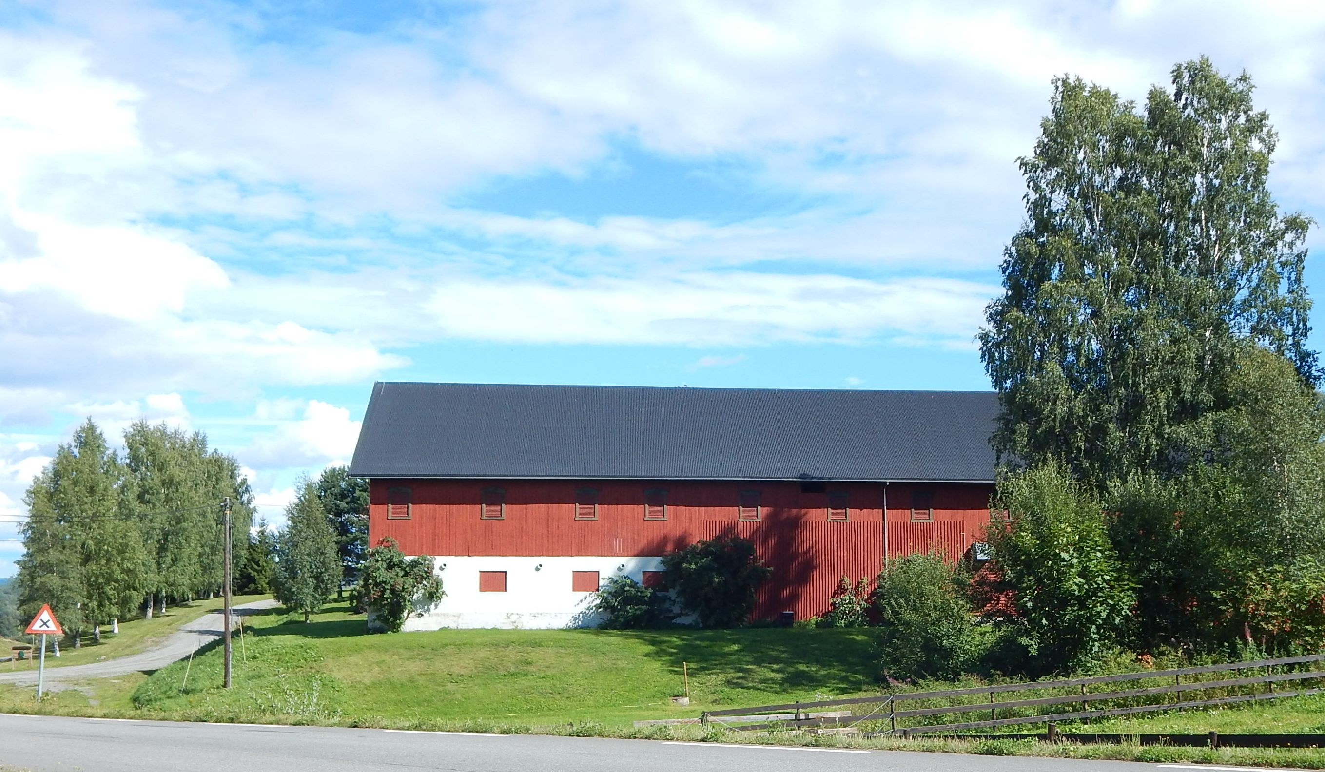 Låven på Arneberg nordre i Stange kommune